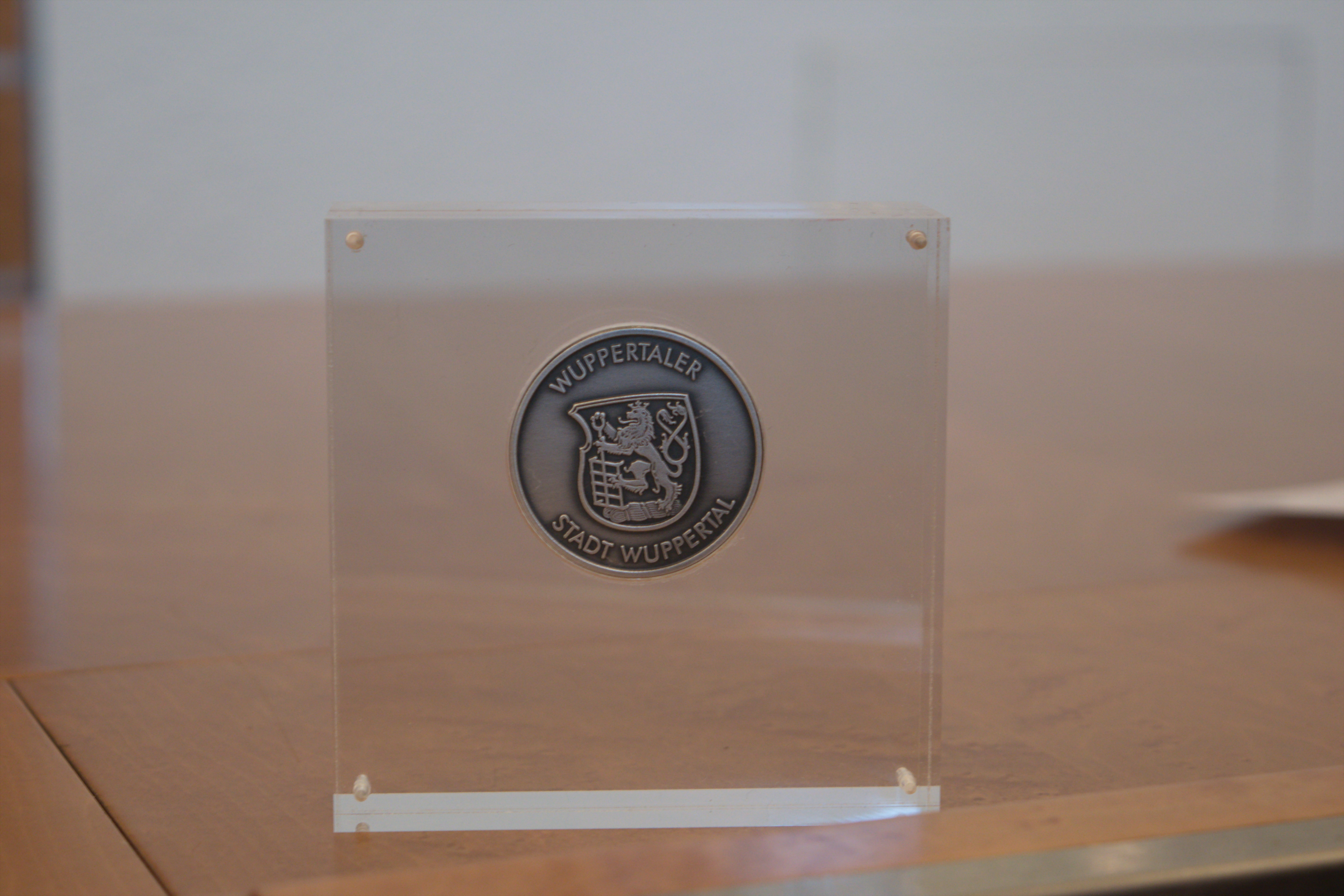 Verleihung des "Wuppertalers" für besonderes ehrenamtliches Engagement am 3. Oktober 2016 an Beate Blaschczok, Stefan Mageney, Thomas Niehus und Wolfgang Adolf Weil. Nicht anwesend bei der Veranstaltung: Ewald Proll.